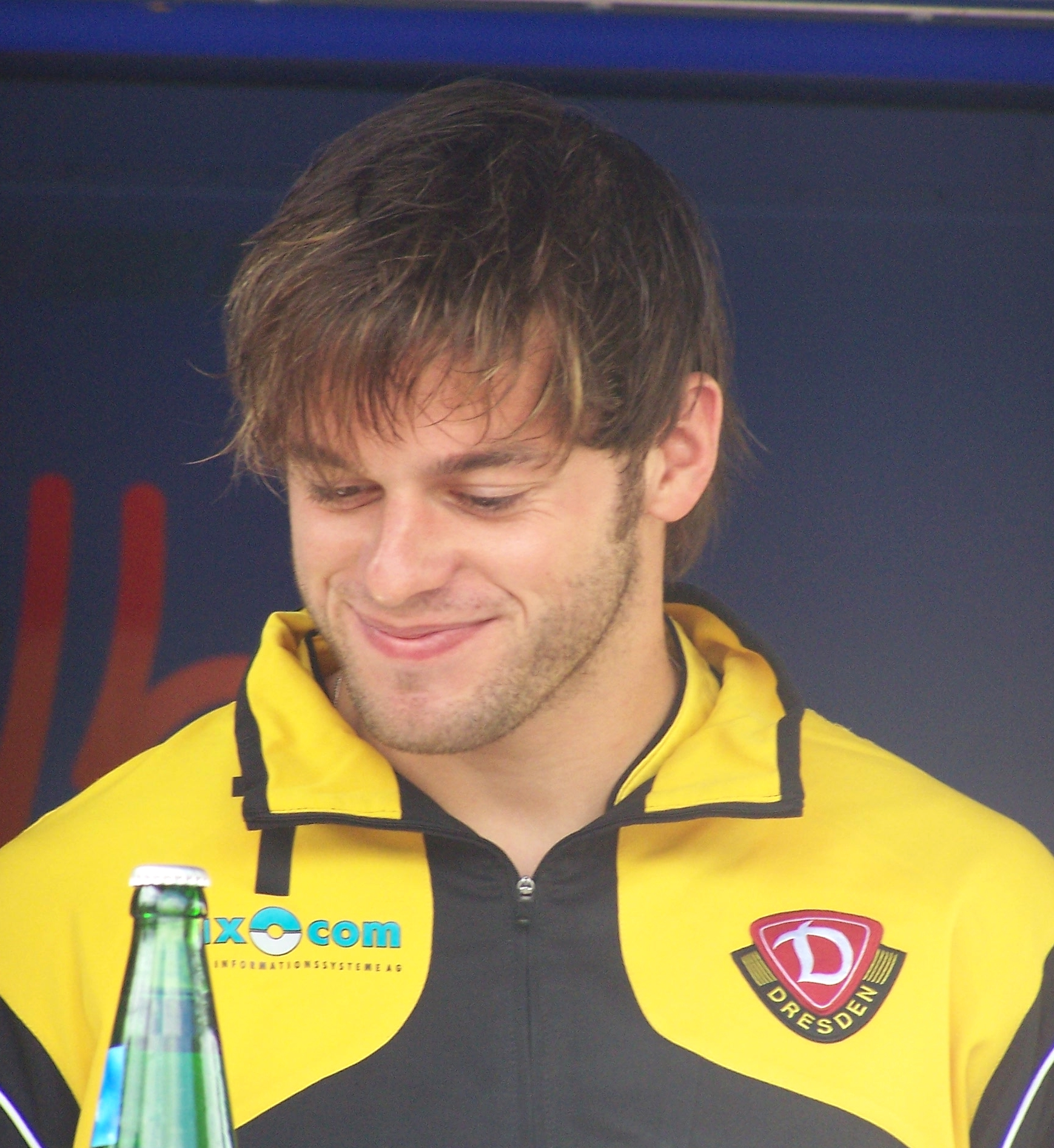 Timo Röttger bei der Teampräsentation von Dynamo Dresden zum Start der Drittliga-Saison 2008/09